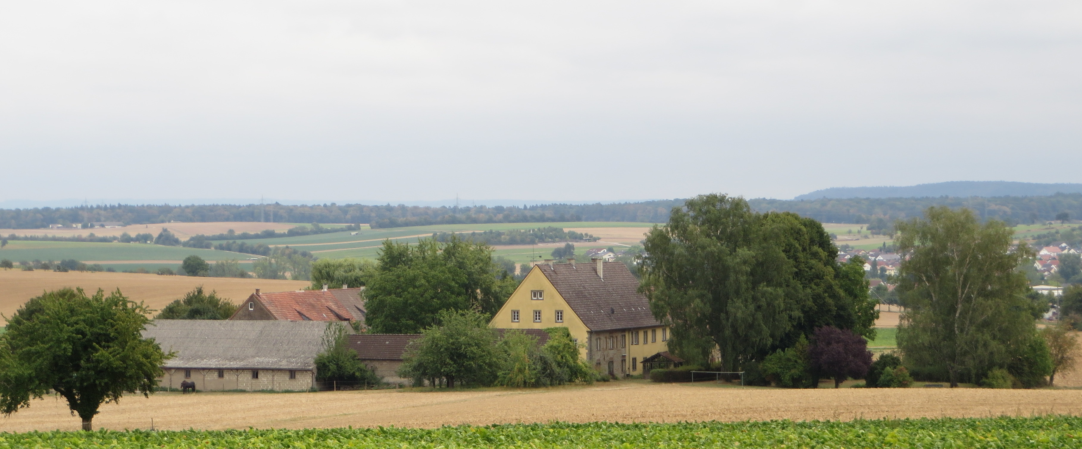 Der Willenbacher Hof bei Oedheim vom Obstversuchsgut Heuchlingen aus gesehen.